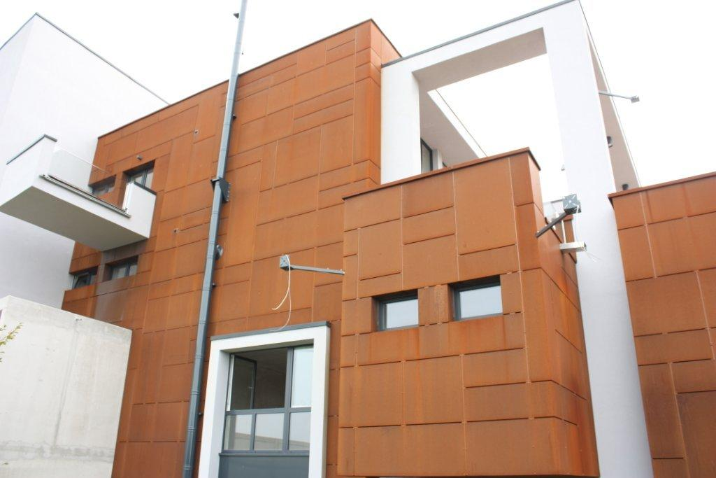 sichtbar befestige Plattenfassade mit 3 mm Cortenstahlblech